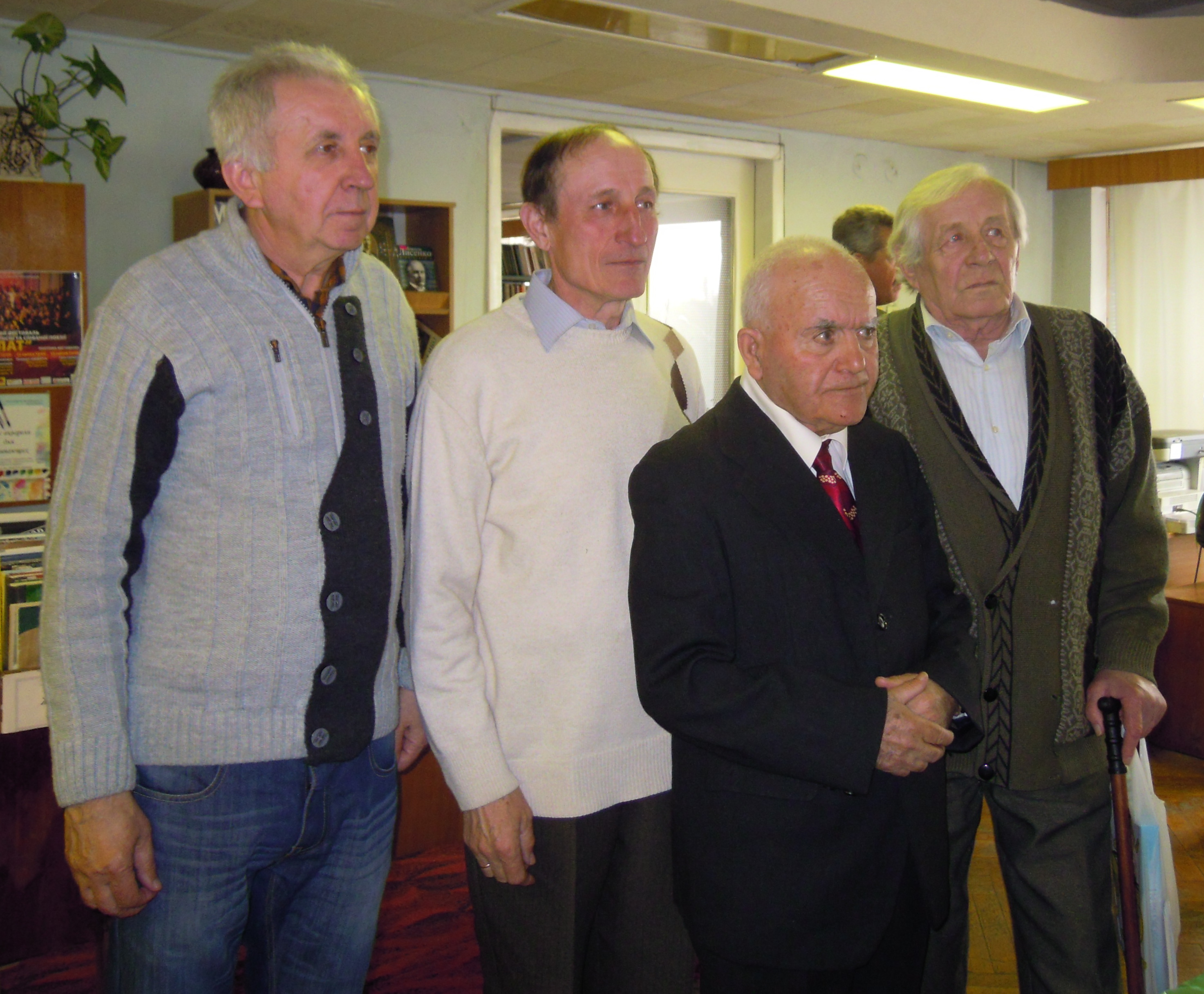 Вечір, присвячений 90-річчю від дня народження відомого журналіста, літератора, громадського діяча, педагога Вазгена Христофоровича Балаяна.